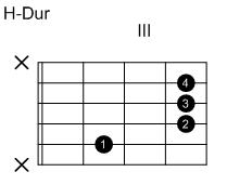 Eigenanfertigung